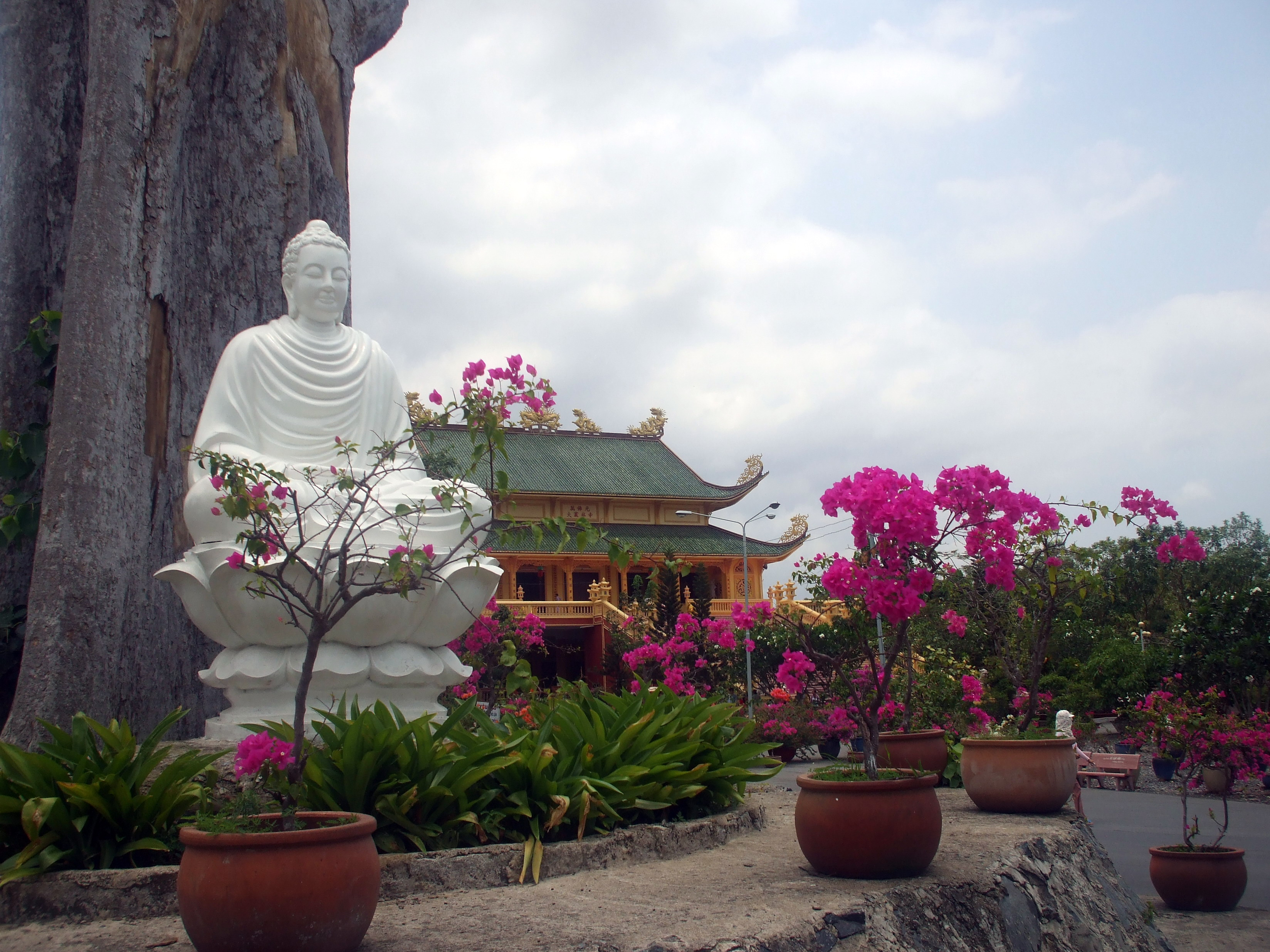 Tượng Phật Thích Ca trong khuôn viên Vạn Phật Quang Đại Tòng Lâm Tự ở Bà Rịa-VũngTàu (Việt Nam).